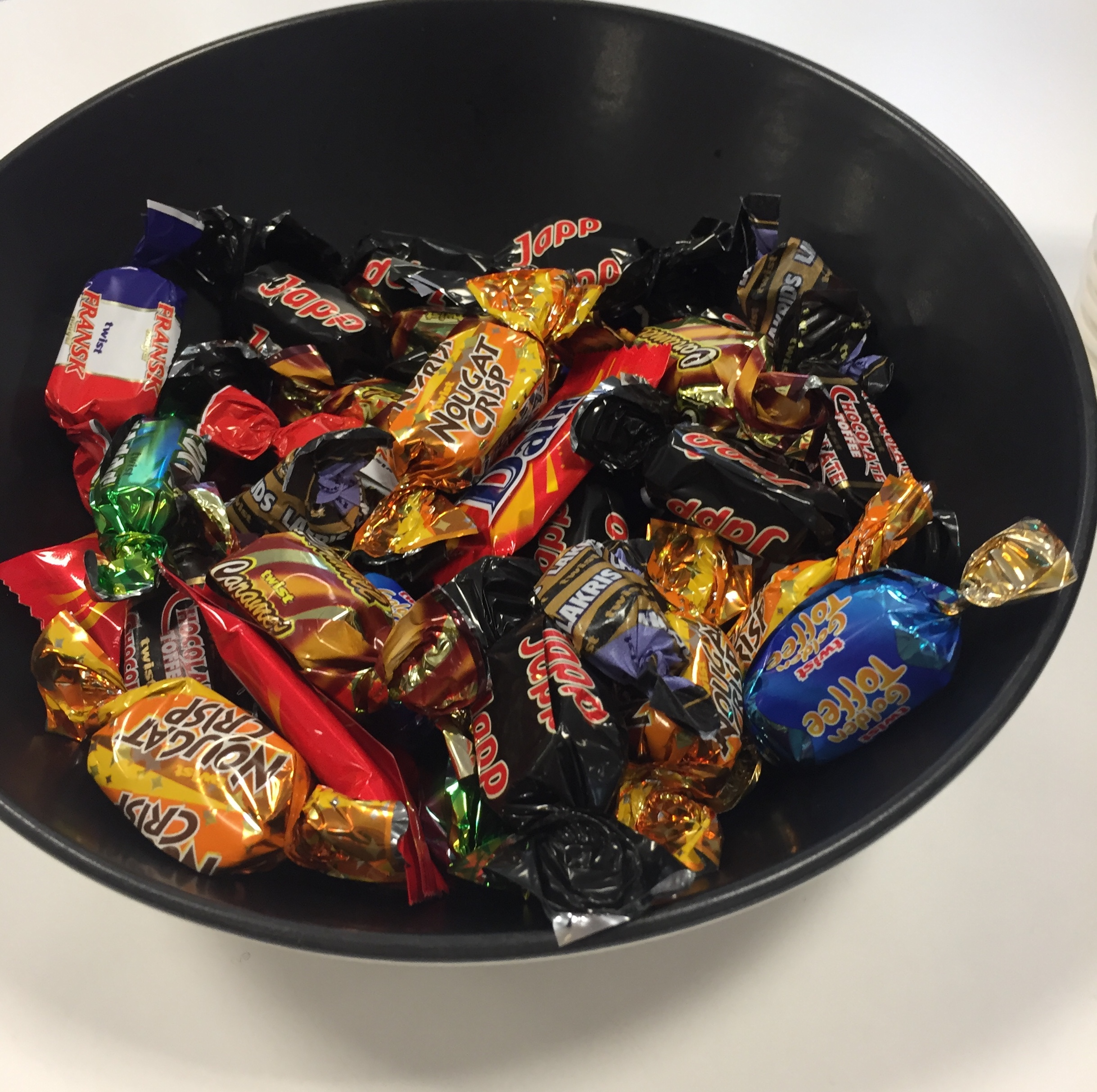 Skål med Twist, 2017.